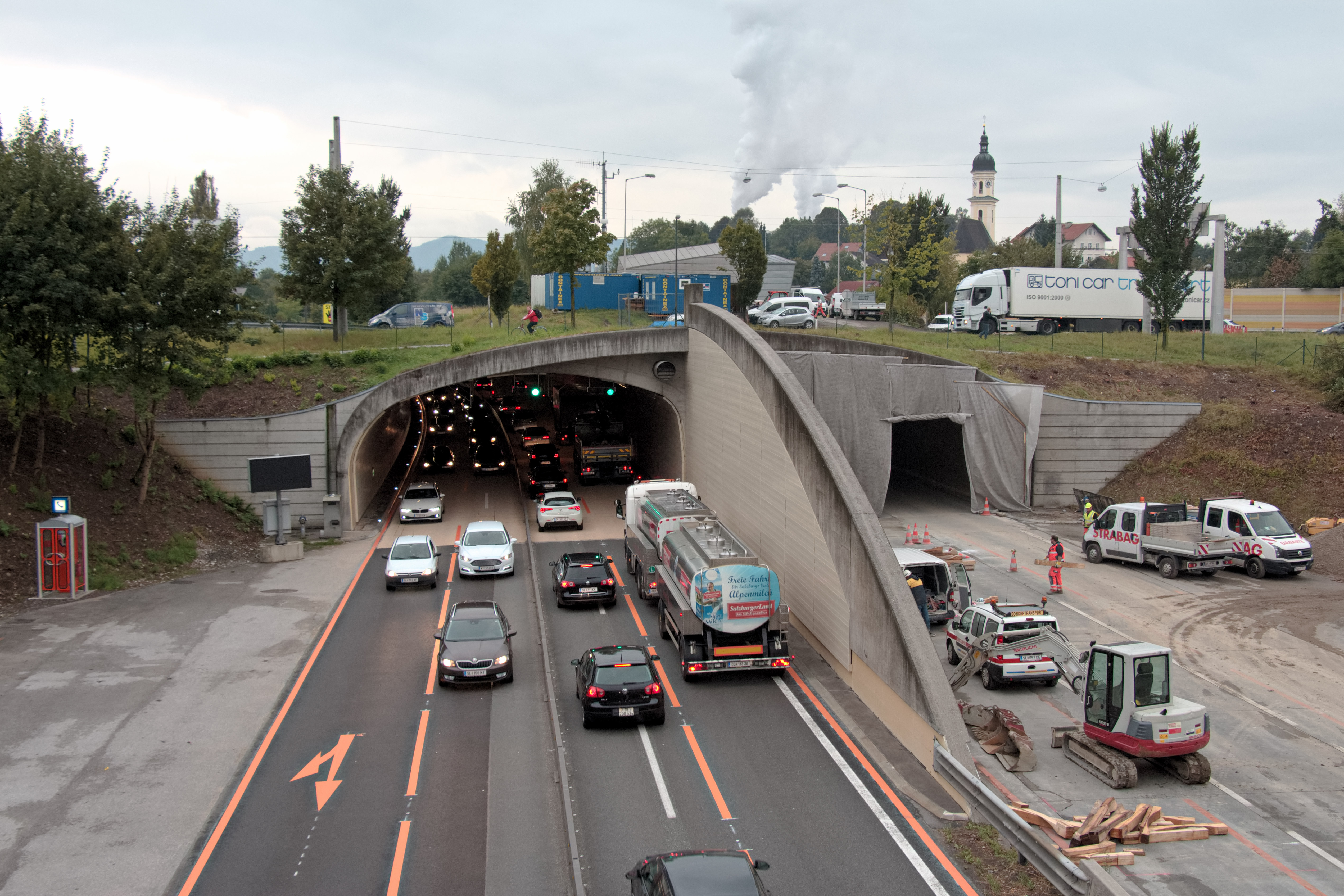 Der Lieferinger Tunnel in Salzburg war während der Instandsetzungsarbeiten im Jahr 2016 abwechselnd nur durch eine Röhre befahrbar.